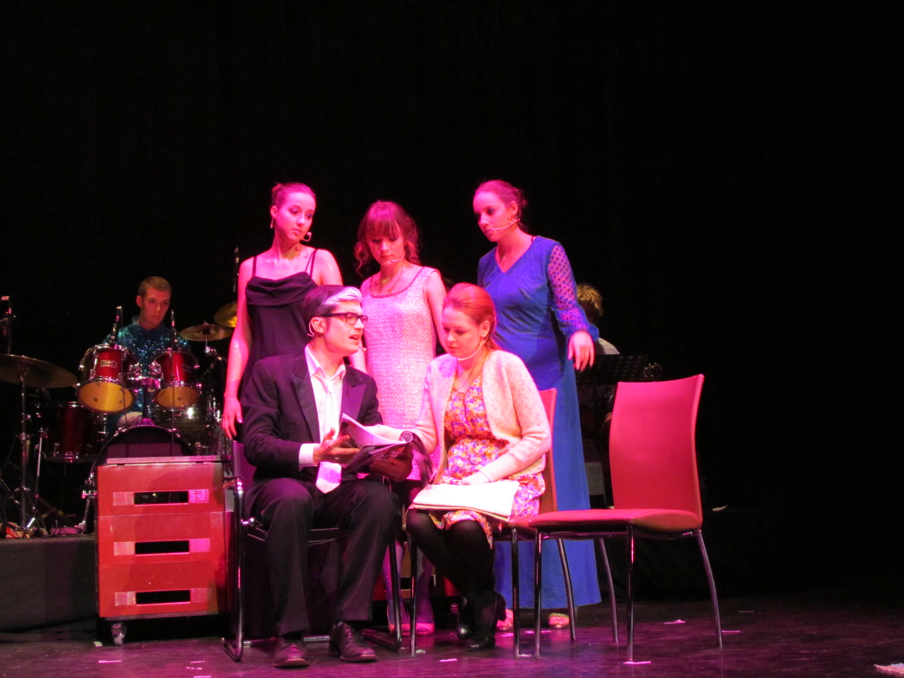 Foto von der Aufführung des Musicals Zum Sterben schön in der Brunsviga in Braunschweig